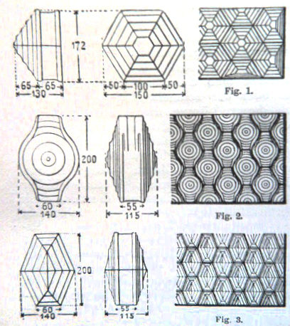 Diese Abbildung zeigt drei verschiedene Typen von mundgeblasenen Glasbausteinen, entworfen von Gustave Falconnier